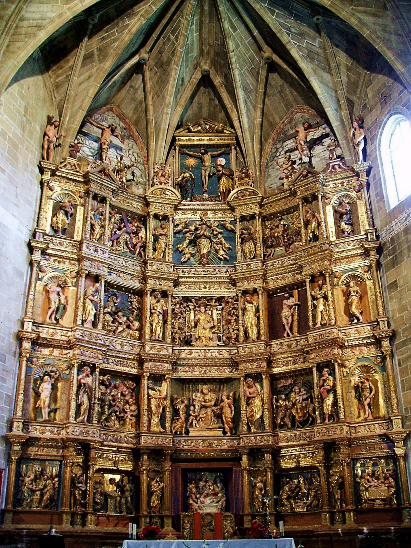 Retablo Mayor renacentista-manierista, obra del taller de Juan de Beaugrant (s-XVI) de la Iglesia parroquial de Santa María la Mayor, San Vicente de la Sonsierra, La Rioja, España/Spain